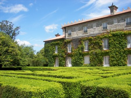 Museo Quiñones de León o Pazo de Castrelos